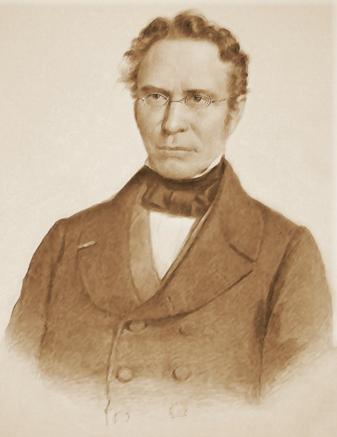 Joseph Lebeau